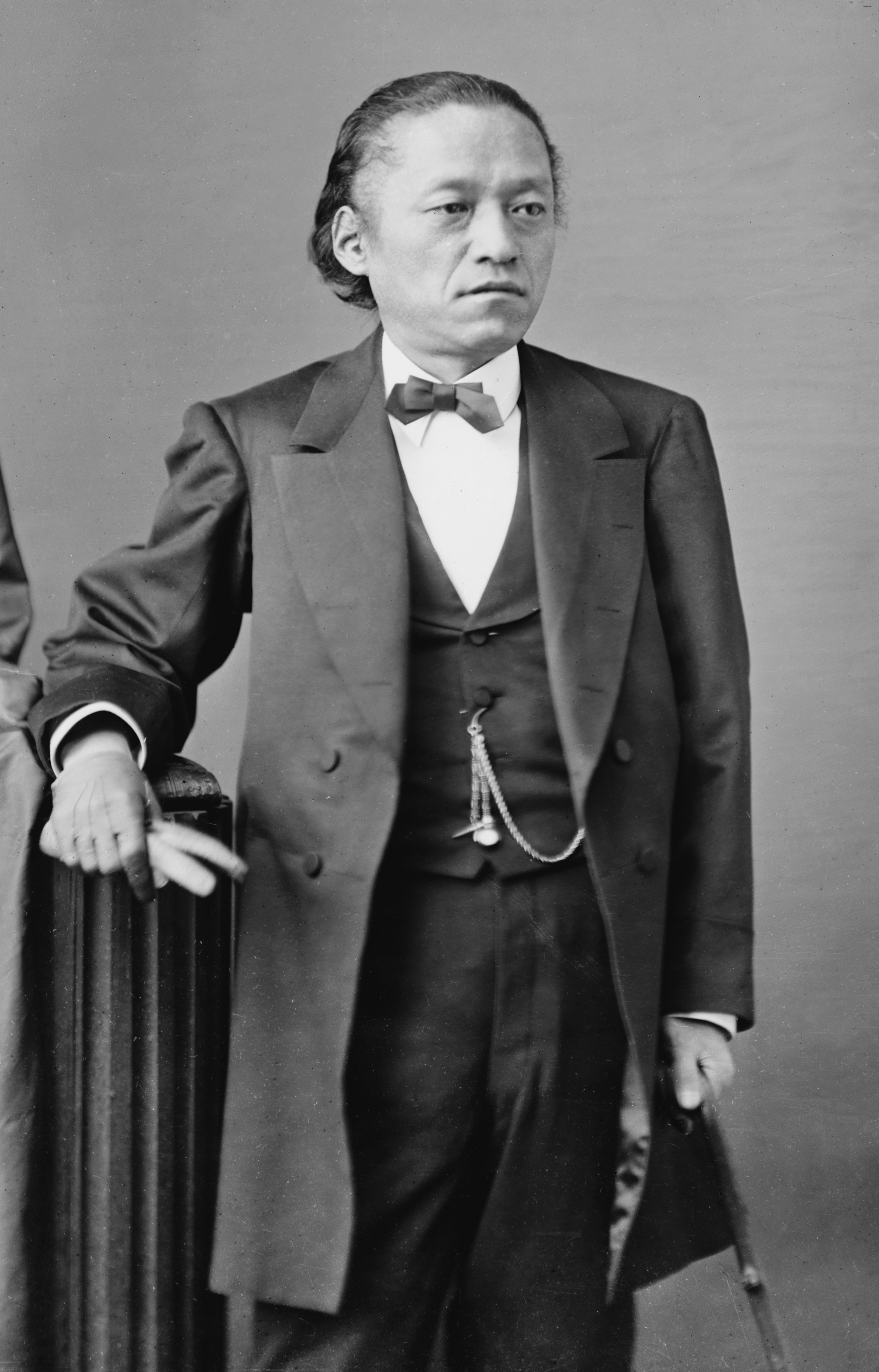 Tomomi Iwakura